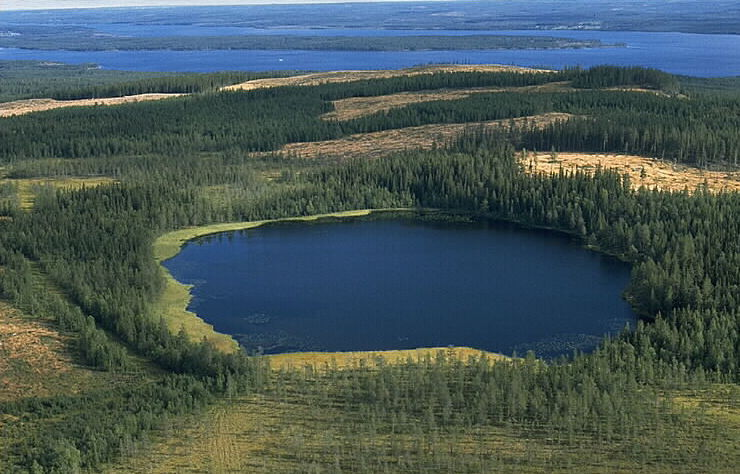 Motiv: Edsåsbergets ödesböle Nyckelord: Flygbilder, Riksintressen Kategori: Insjömiljöer Edsåsbergets ödesböle